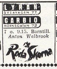 Biografannons för Lyran och Garbio lördag den 20 november 1948.